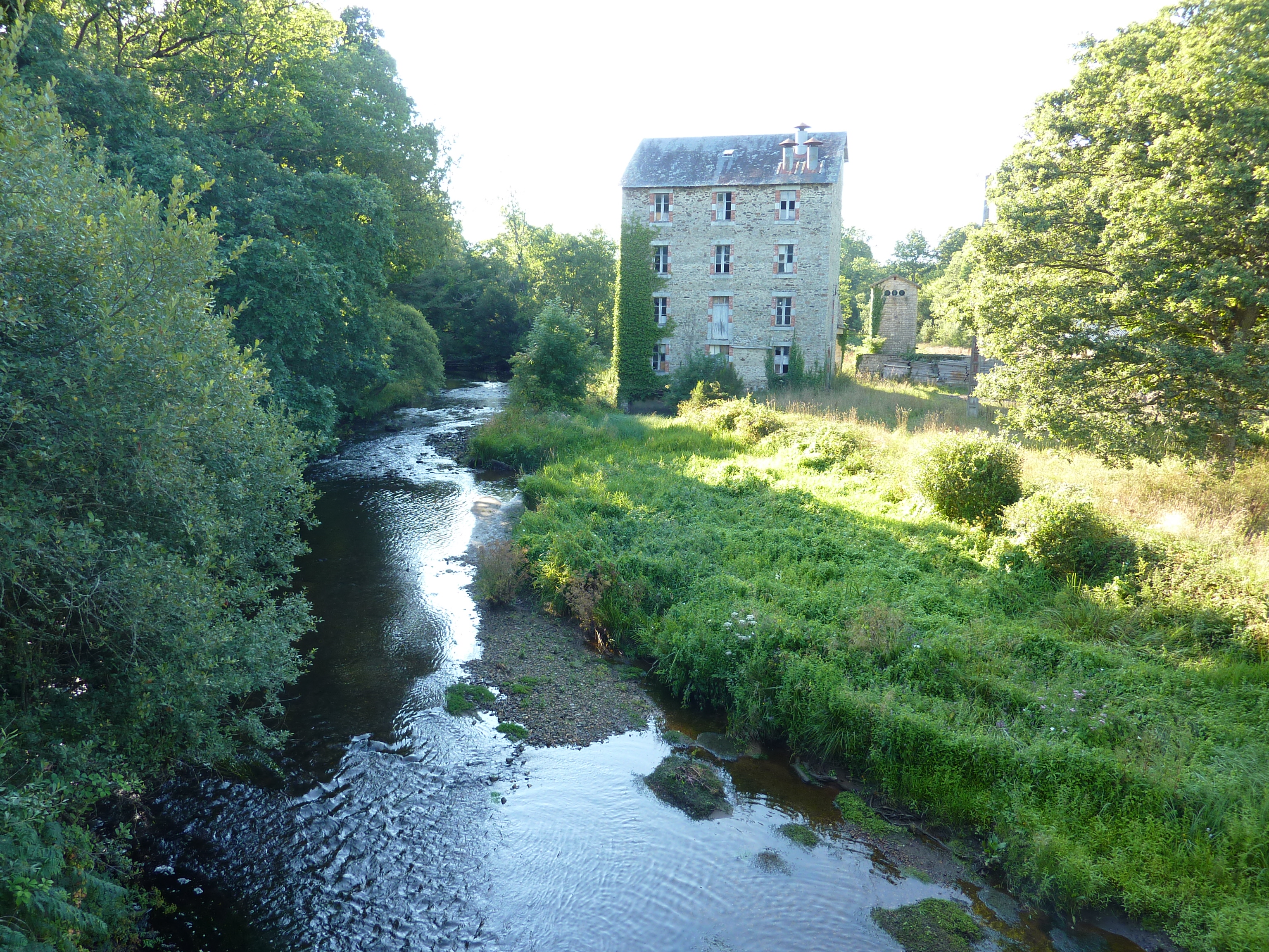 Plouyé: L'Ellez et l'ancien moulin de Pont-Morvan